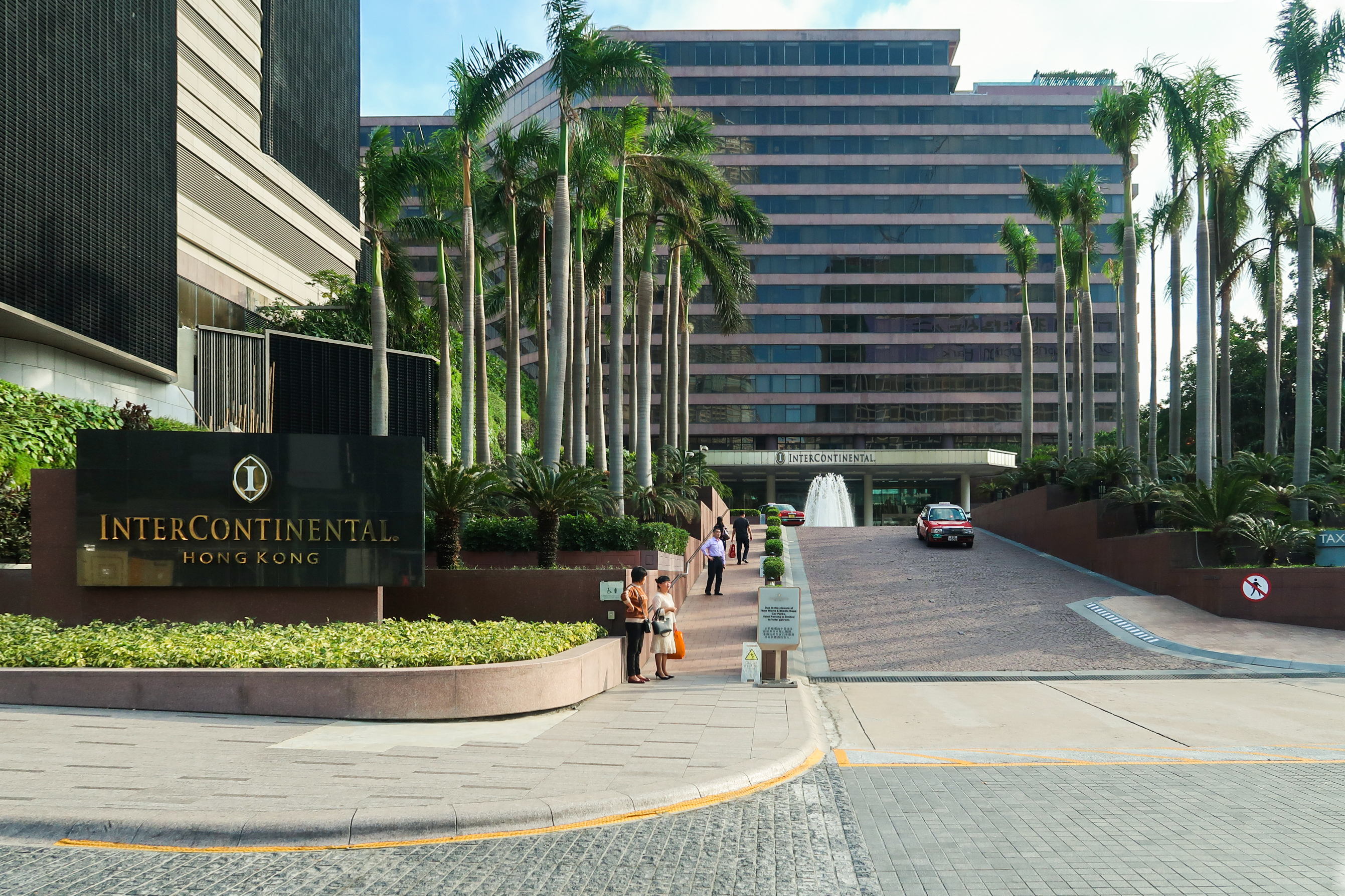 Inter Continental Entrance